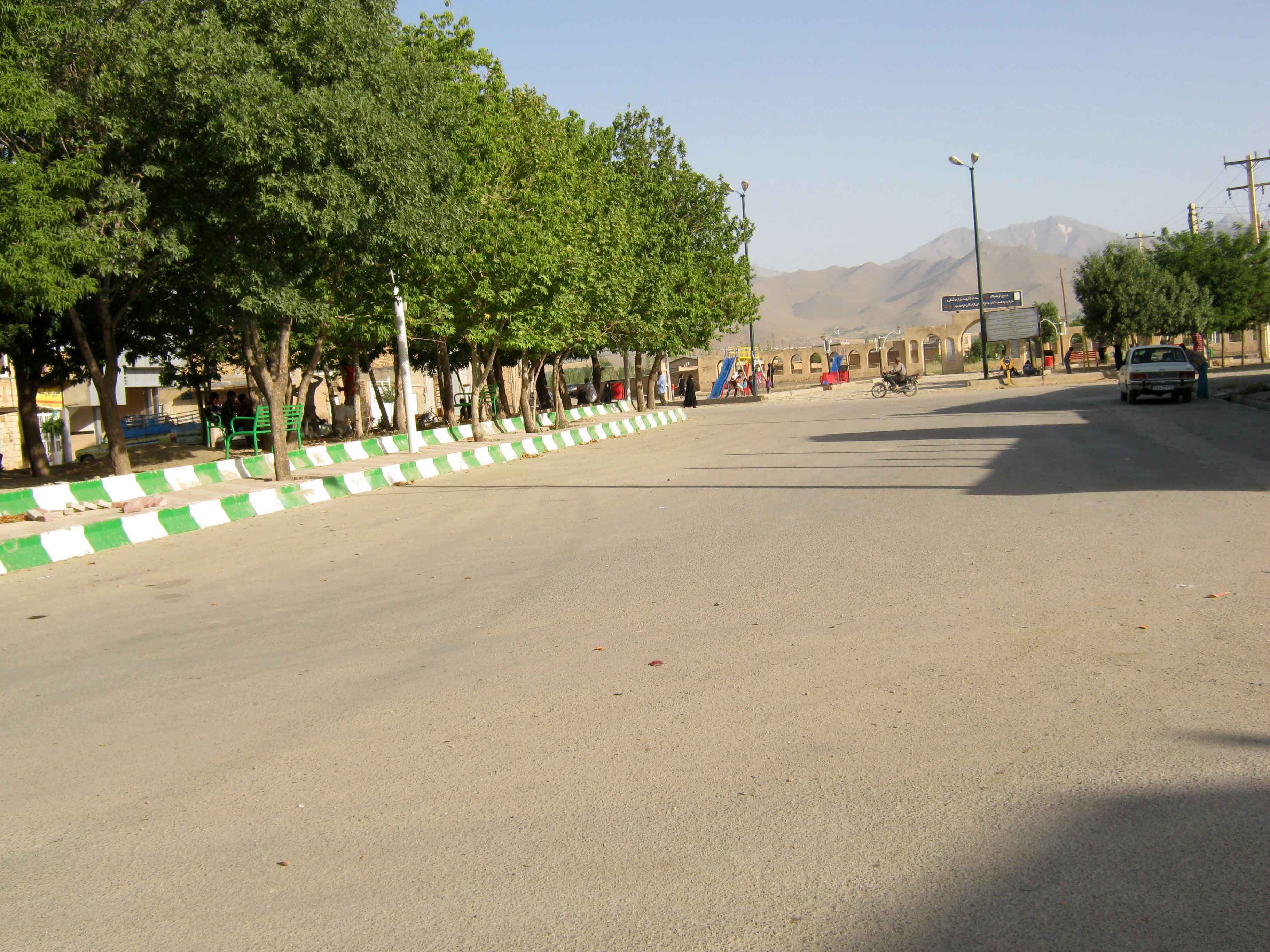 یک روستا از کوهستان الوند